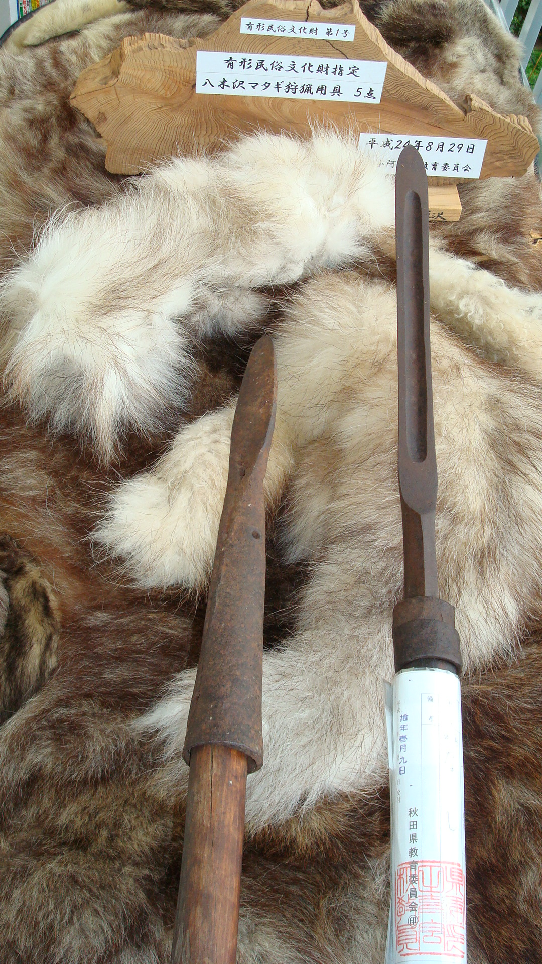 八木沢マタギ狩猟用具 有形民俗文化財 マタギ熊槍とマタギ槍